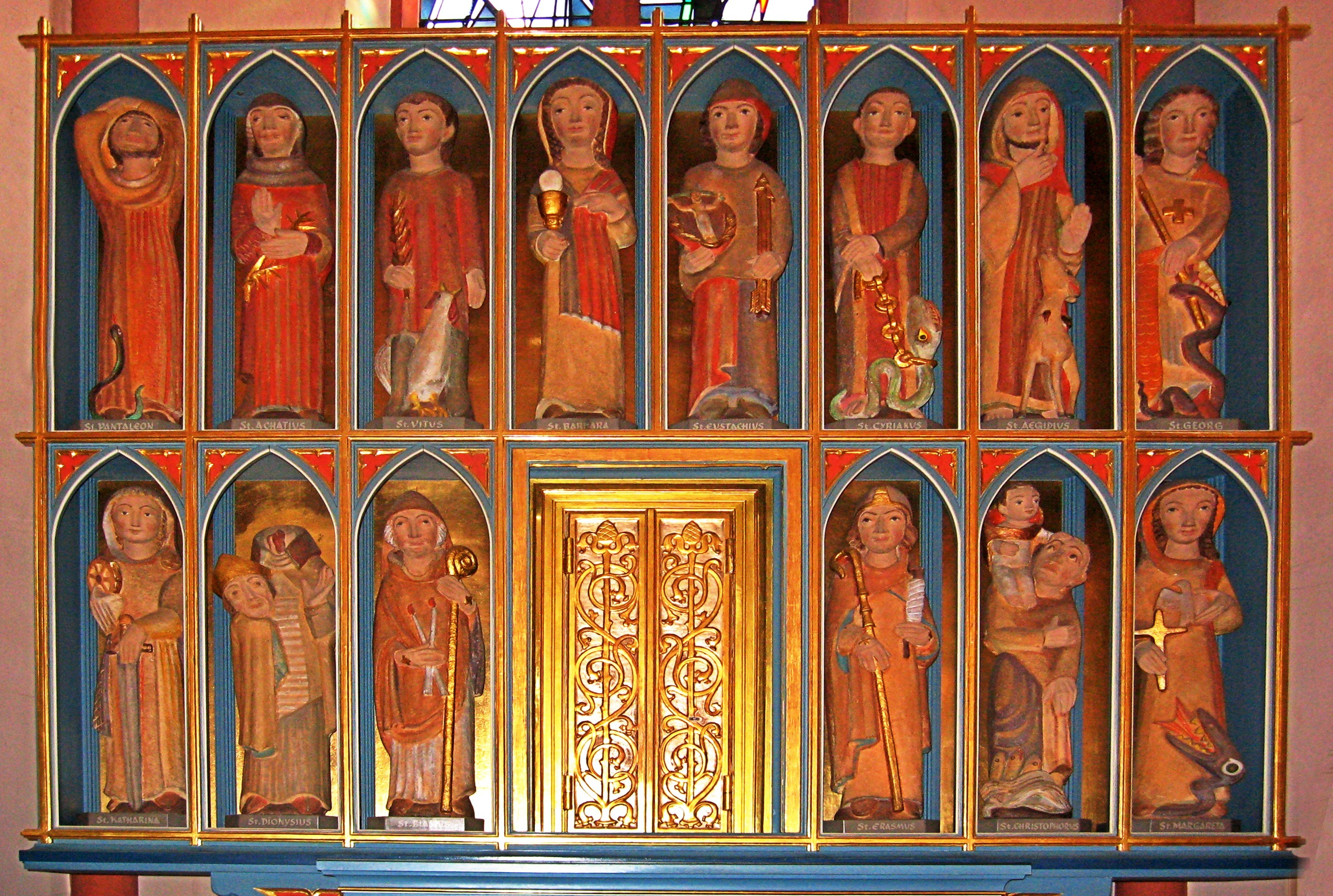 Die vierzehn Nothelfer in St. Maximin in Pachten